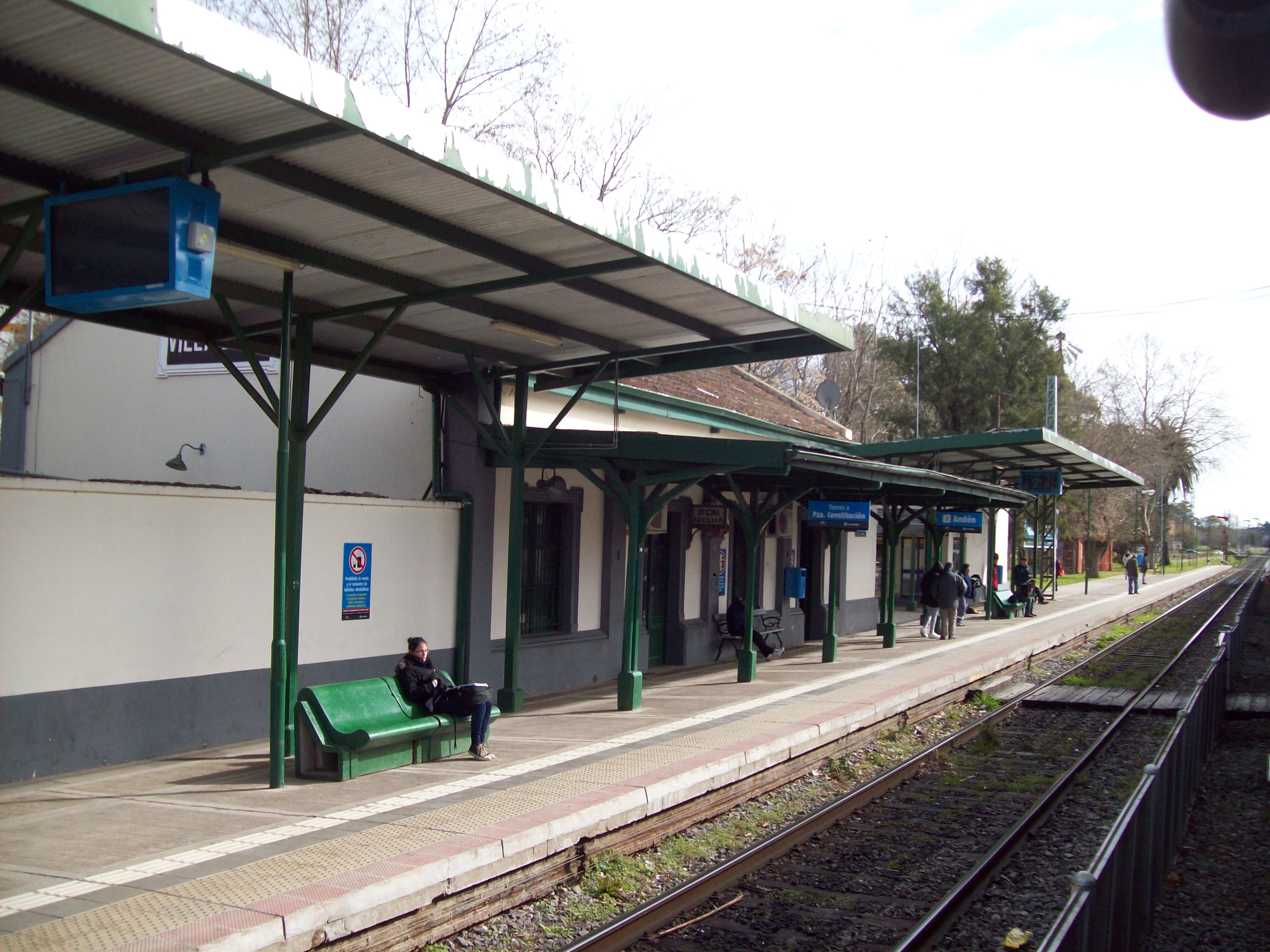 Estación Ringuelet del Ferrocarril Roca, partido de La Plata, provincia de Buenos Aires, Argentina.